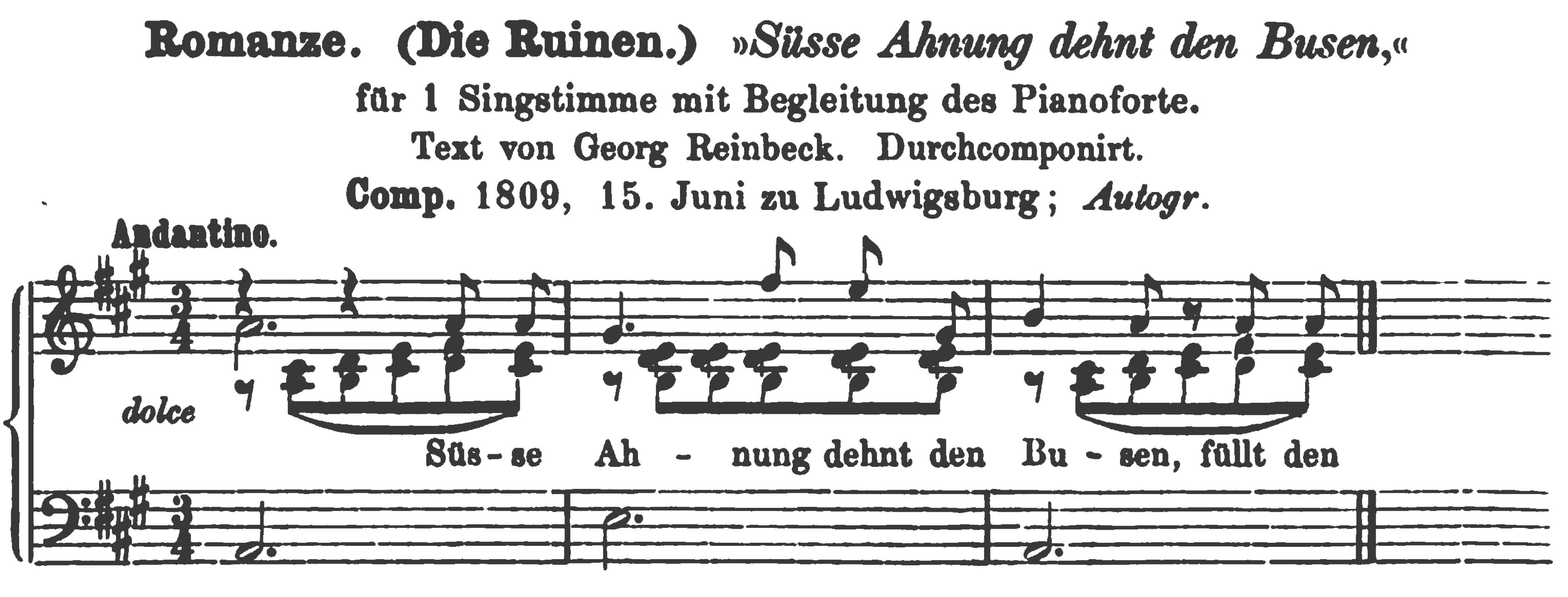 Romanze („Süße Ahnung dehnt den Busen“), Komposition: Carl Maria von Weber, Text: Georg Reinbeck, 1809.